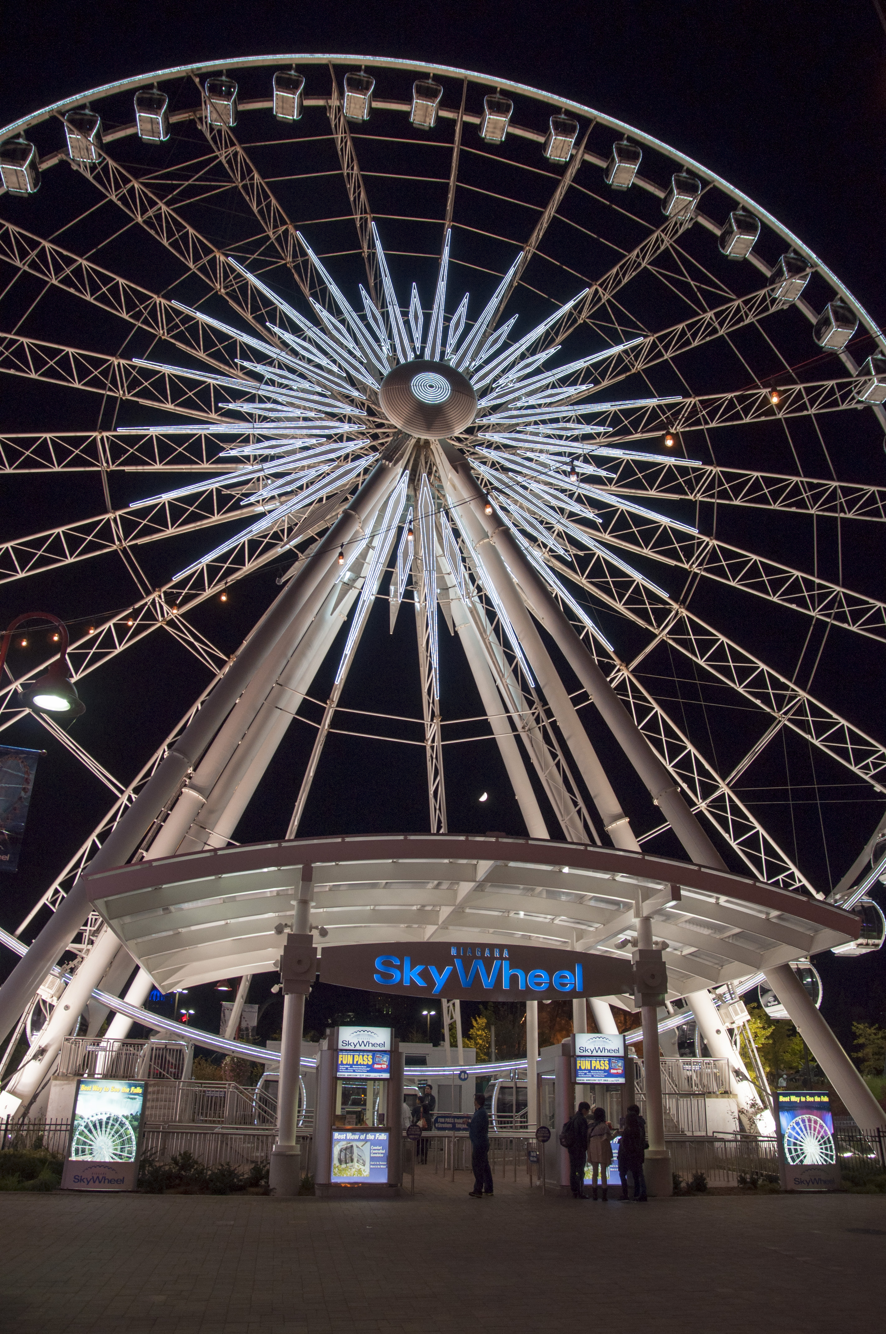 Niagara Falls